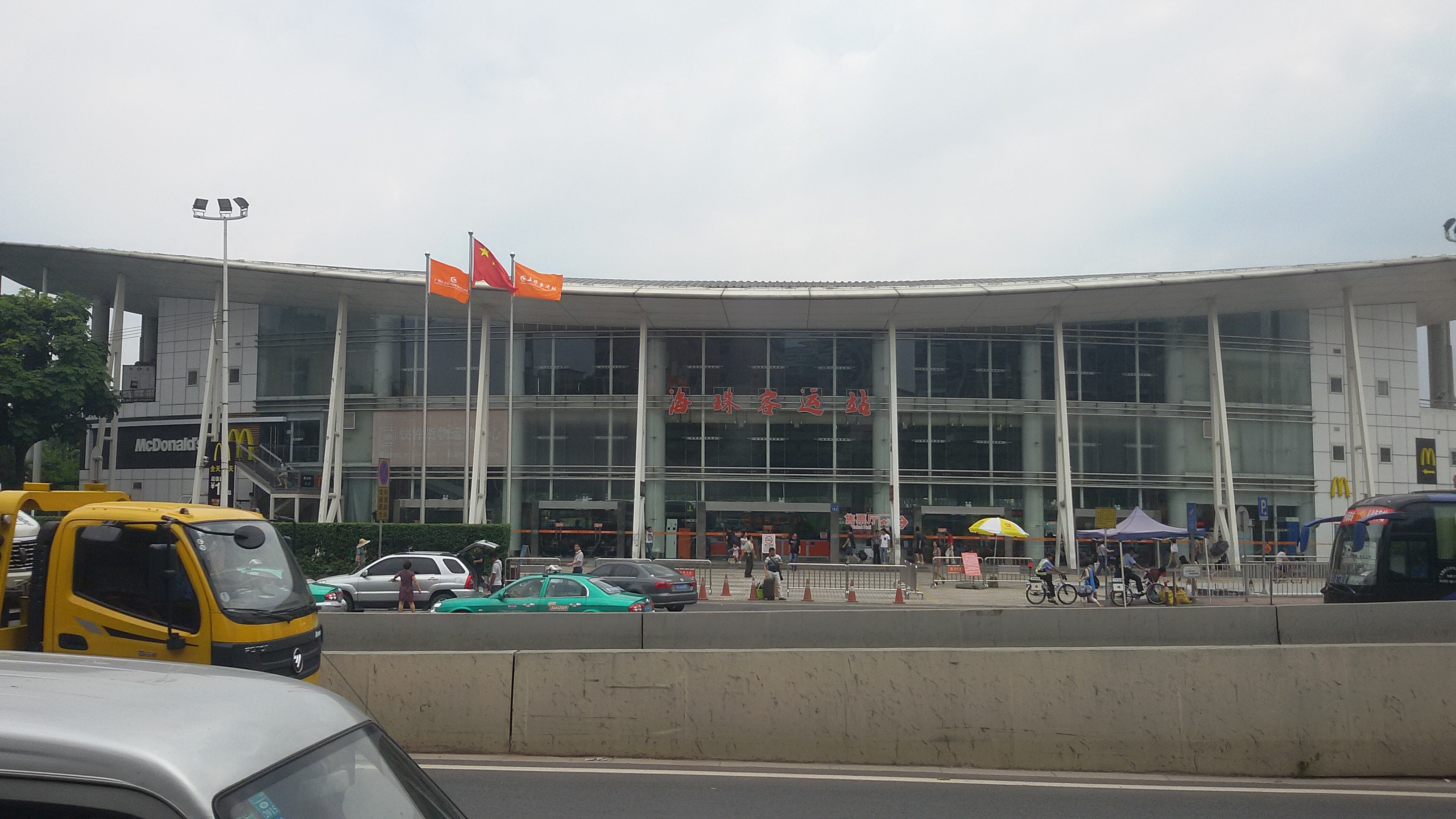 粵語: 海珠客運站嘅1號站樓